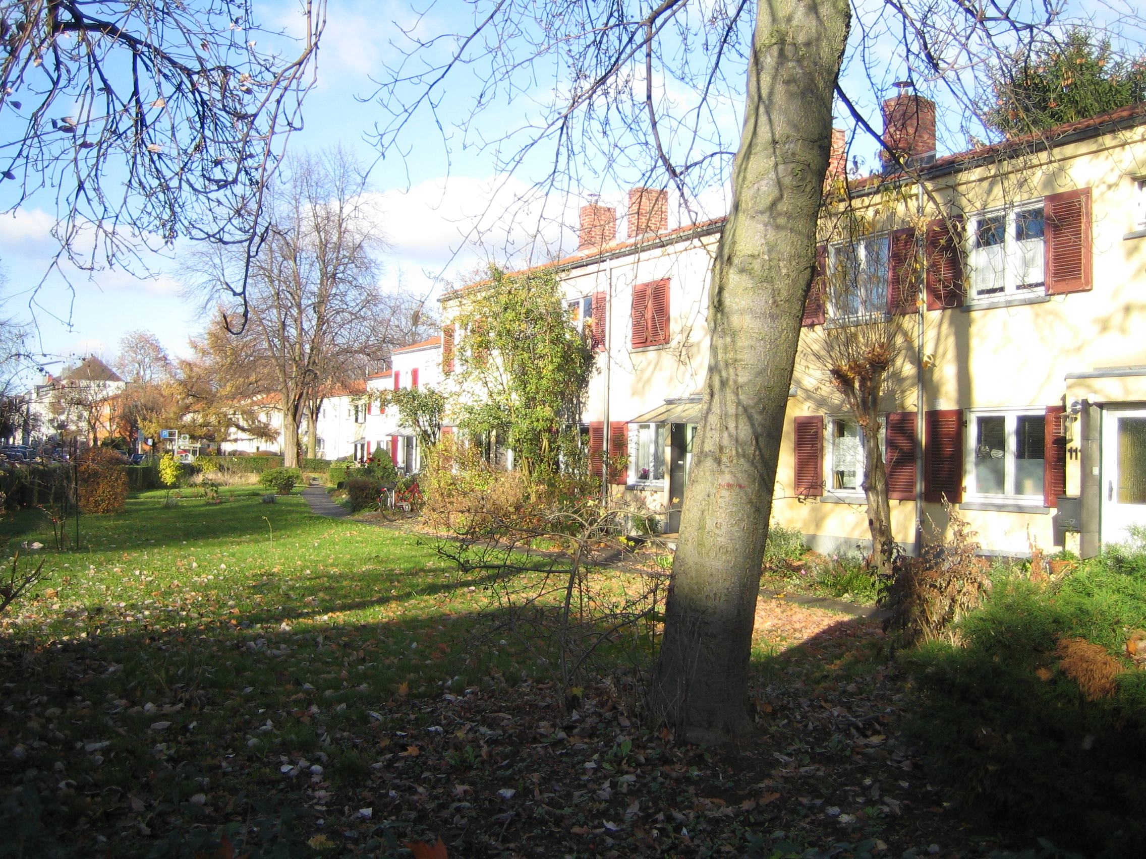 Reutersiedlung Bonn - Wohnhäuser - unter Denkmalschutz - Erbaut 1949-1952 von Prof Max Taut, Berlin